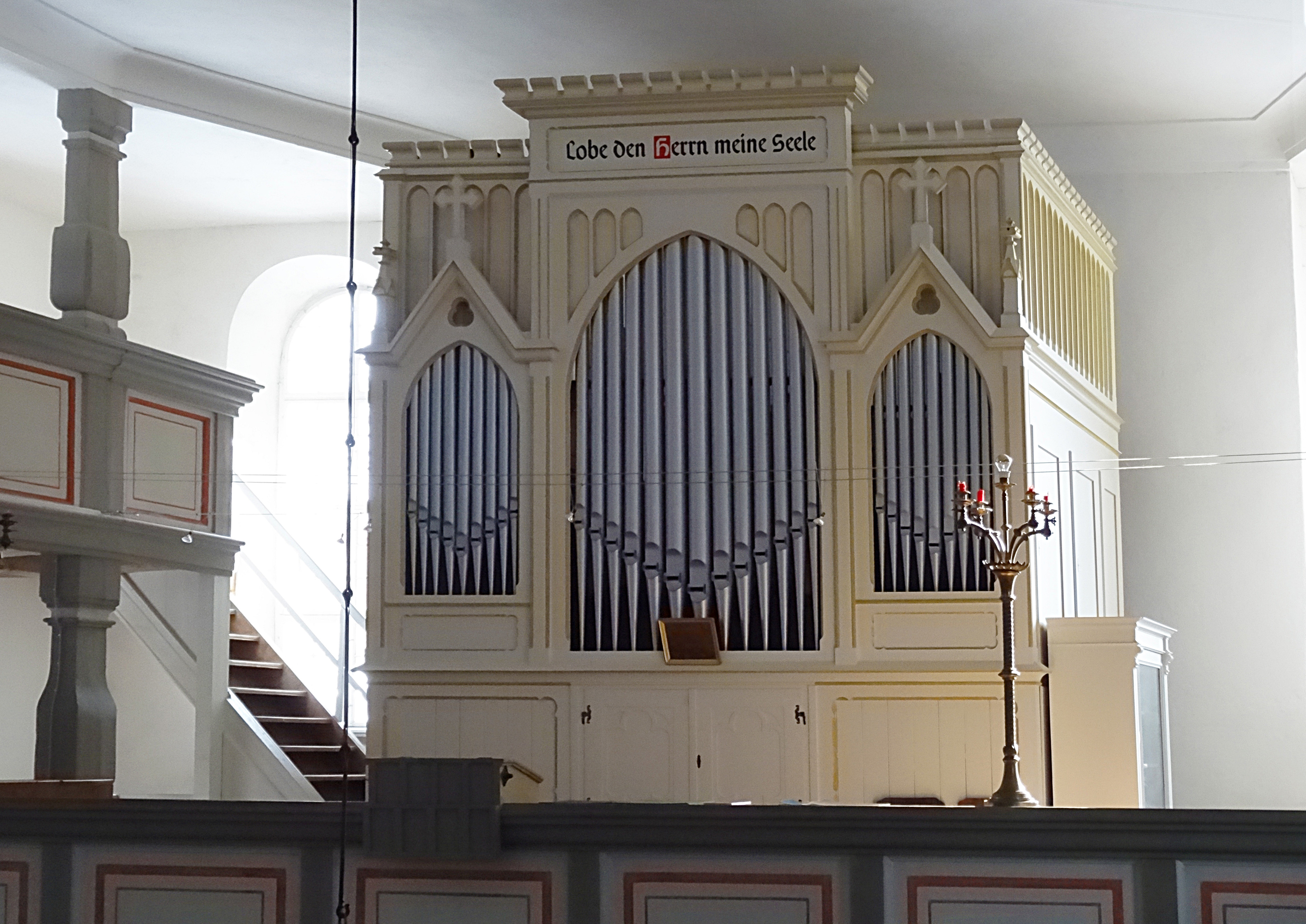 Die Orgel von Karl Robert Barth (1880) aus der Kapelle in Neuensalz wurde 1978 an die Evangelische Kirche in Jonsdorf verkauft und 1981 eingebaut [1]